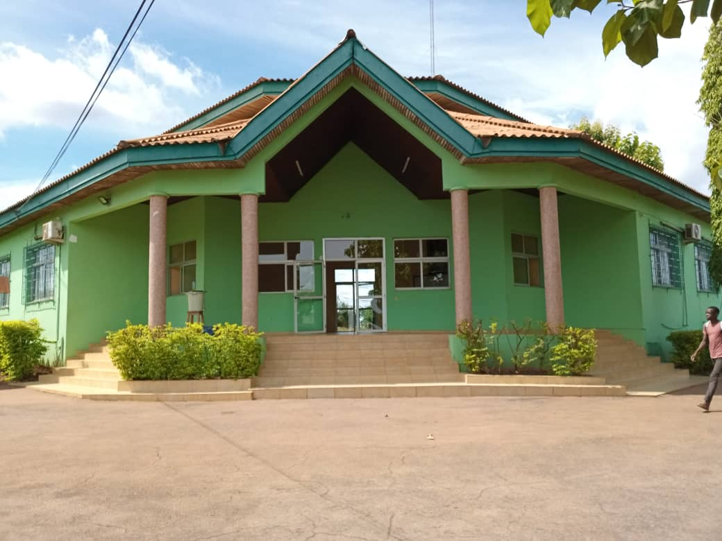 Bâtiment